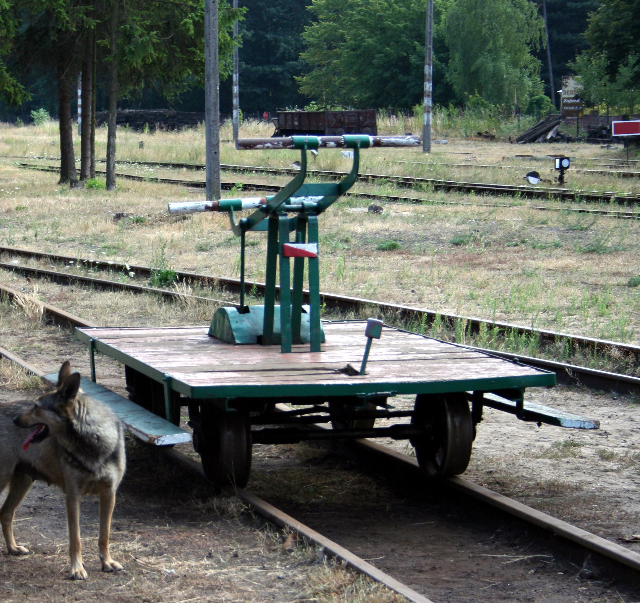 Drezyna w Zabytkowej Stacji Kolei Wąskotorowej w Rudach